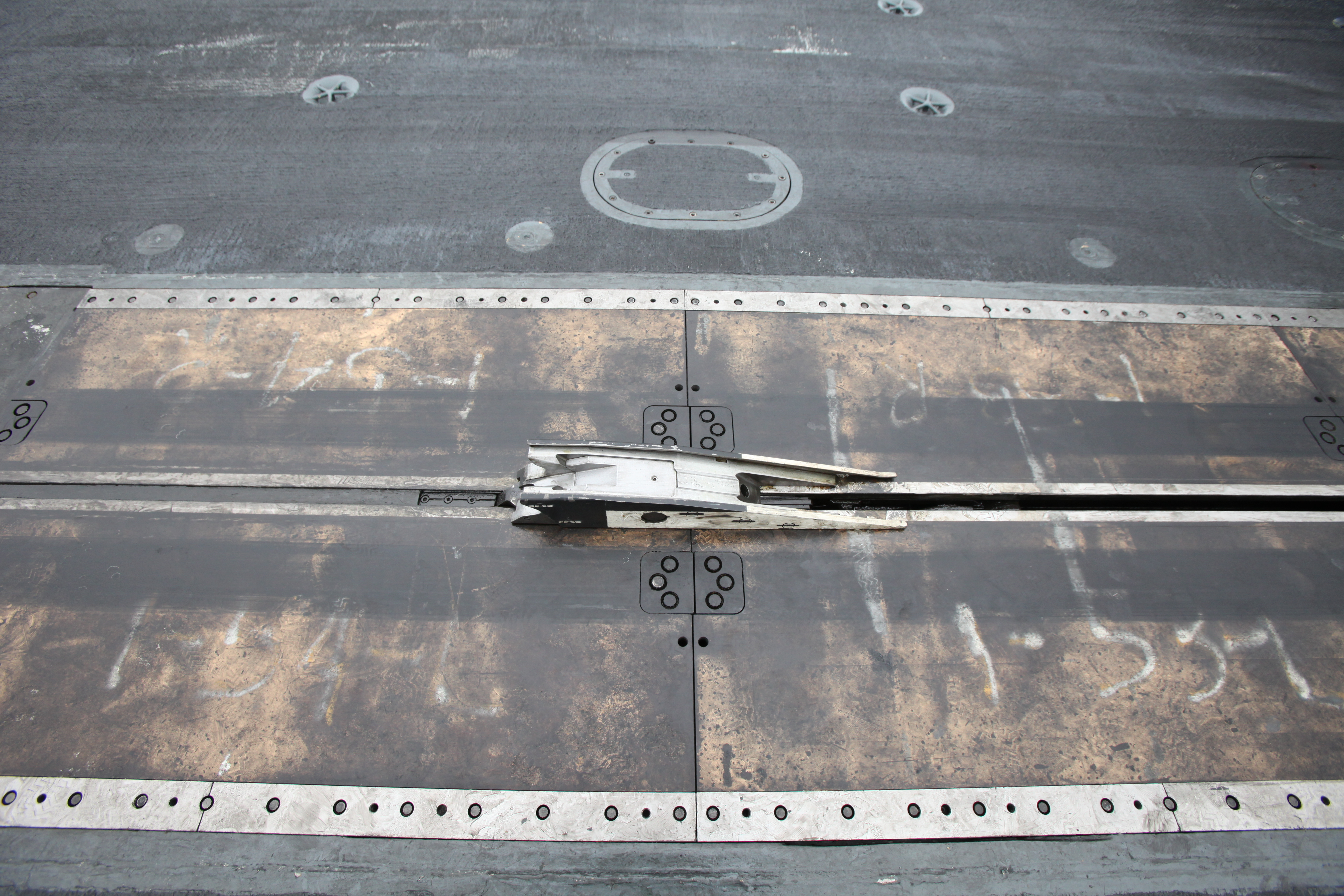 Catapult on USS Nimitz